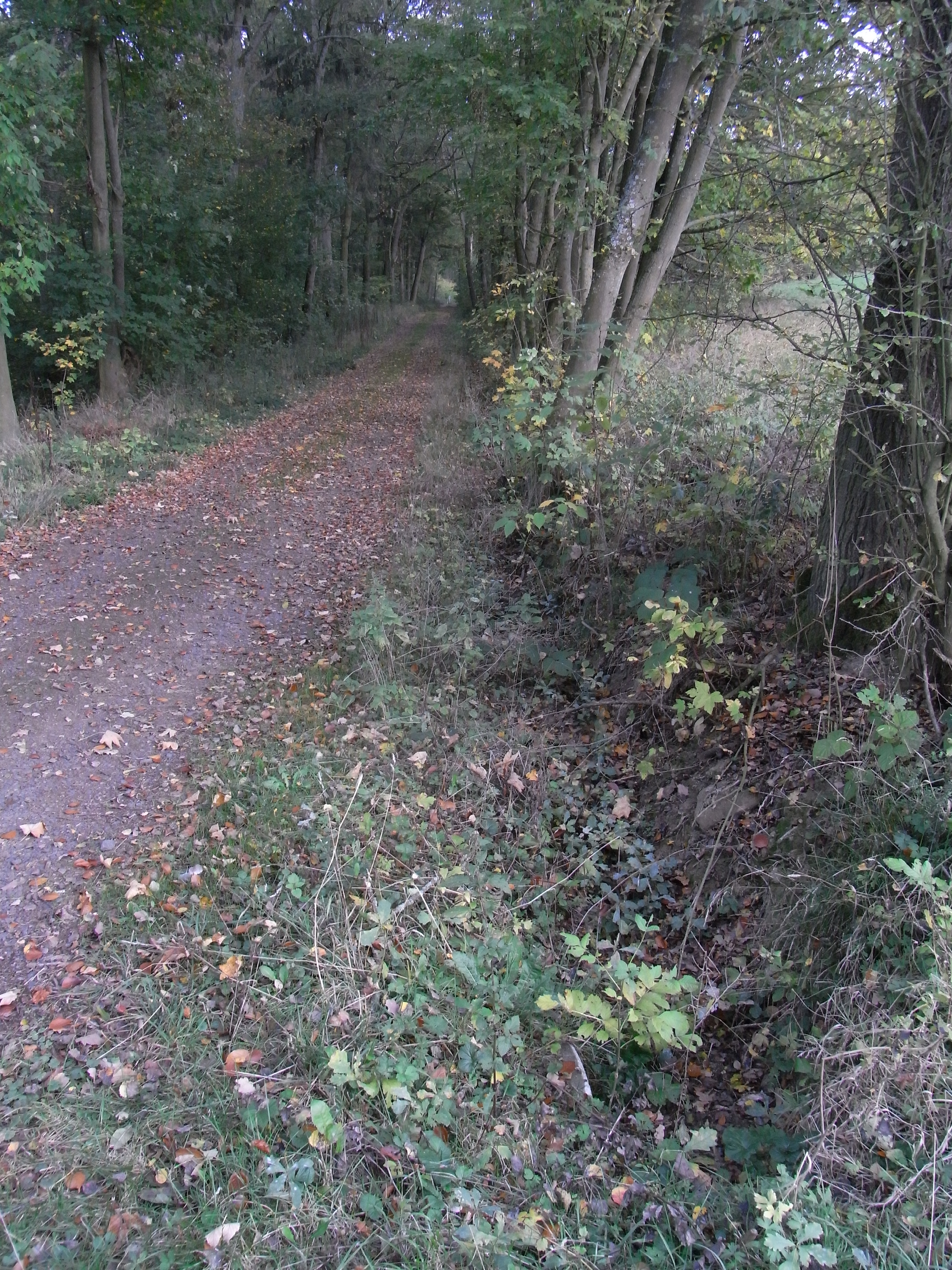 Graben an einem als "Privatweg" titulierten Waldweg zu Inges Baude an der Wiese am "Forsthaus Winterstein" mit dem offiziellem Aitzenbach